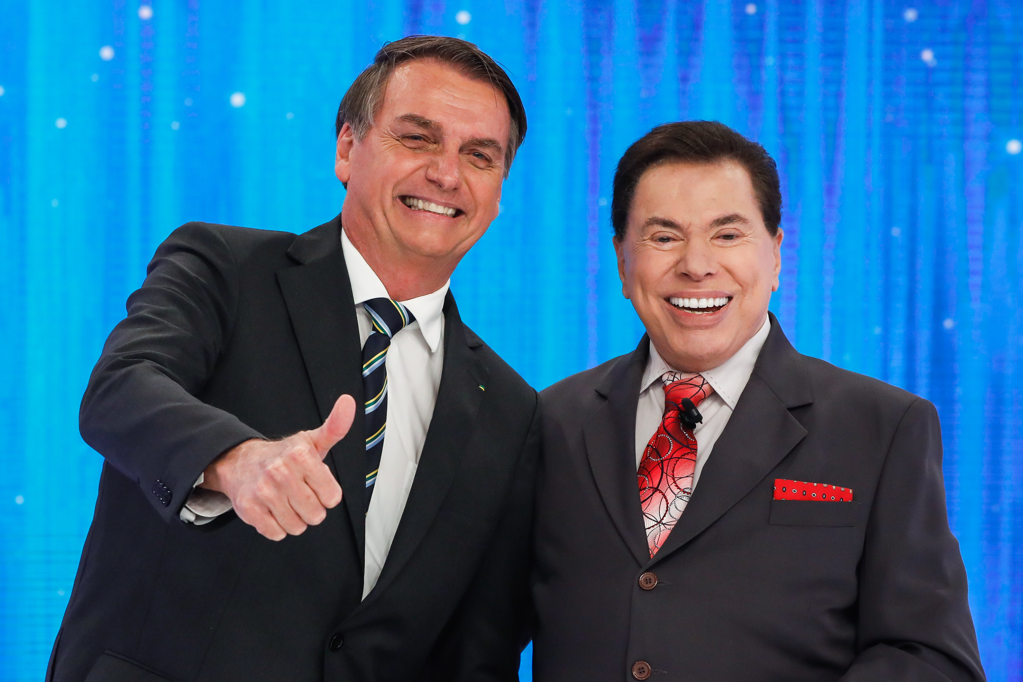 (São Paulo - SP, 02/05/2019) Presidente da República Jair Bolsonaro, durante entrevista ao apresentador Silvio Santos. Foto: Alan Santos/PR